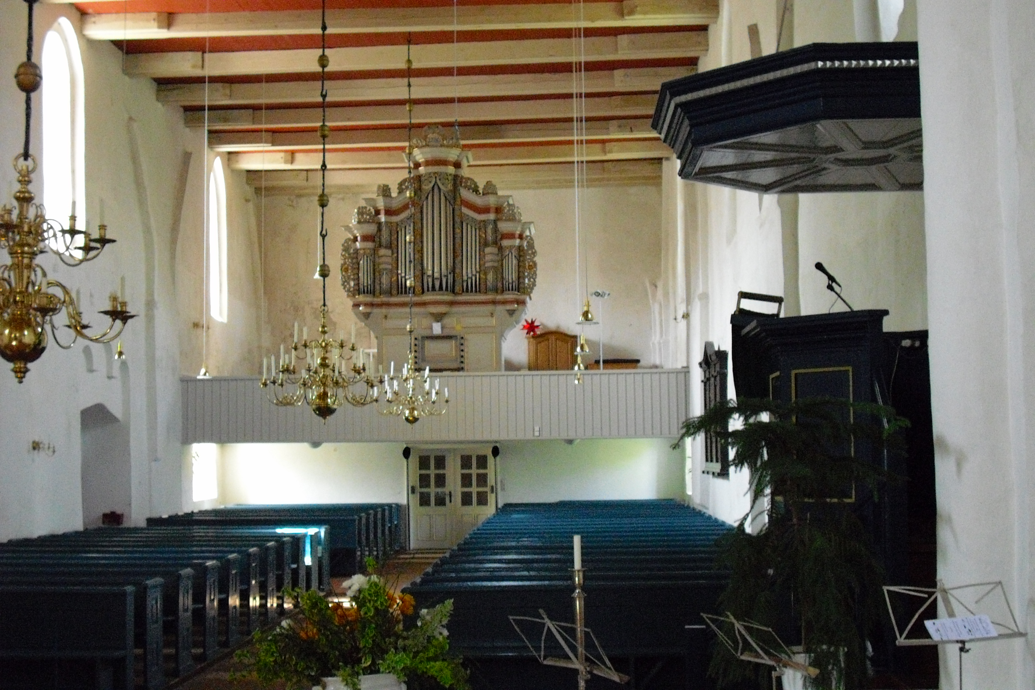 Evangelische Kirche Westochtersum, Kircheninneres, Empore